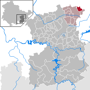 Geroda in Thuringia - Saale-Orla-Kreis